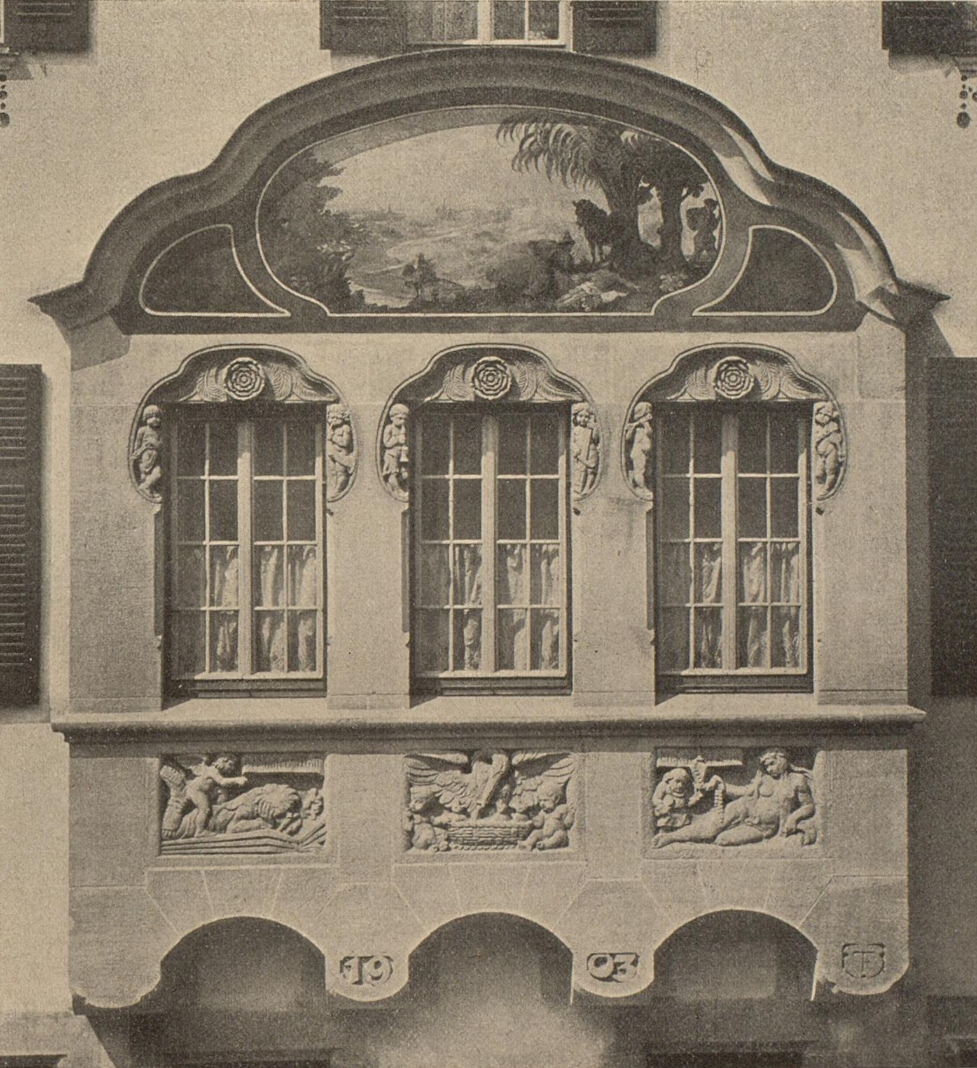 Ehemaliges Haus Zeller, 1903, Erker, Stuttgart, Reinsburgstraße 20. Architekt: Theodor Fischer, Fresko: Gustav Halmhuber, Plastiken: Jakob Brüllmann. Erkerüberdachung und Fenster schließen mit einem Fischerbogen ab.